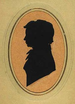 Johan Sigismund Møsting Tillisch (1810-1887), Danish general